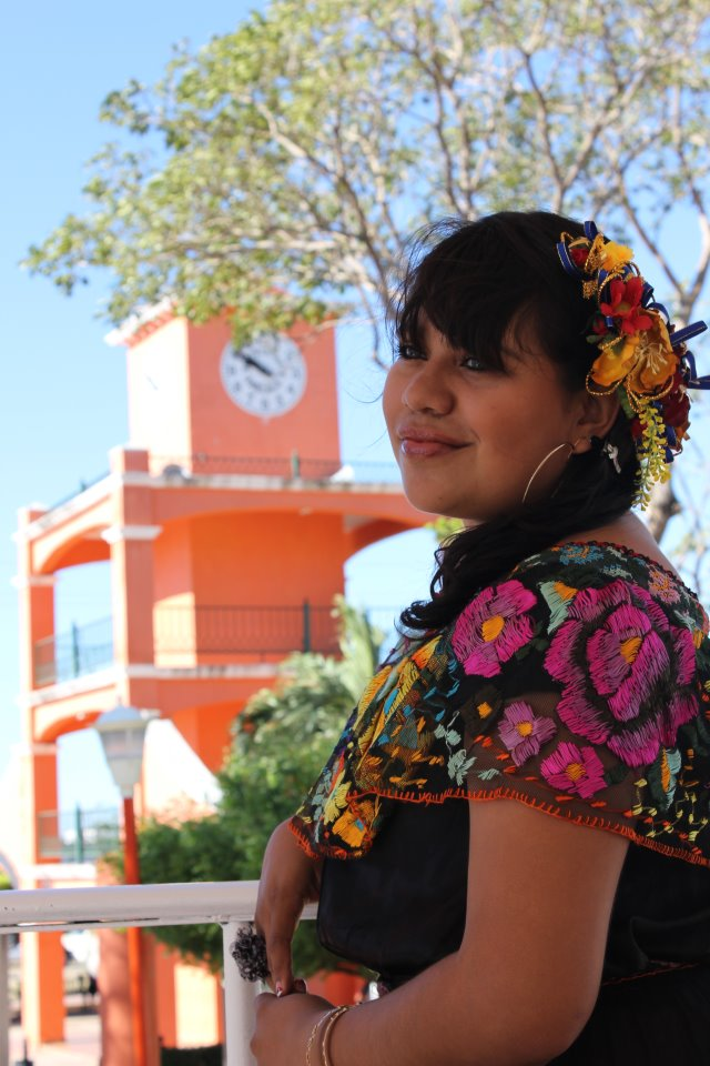 Traje tipico de Chiapas fotografia de Jorge Luis de los Santos Trujillo